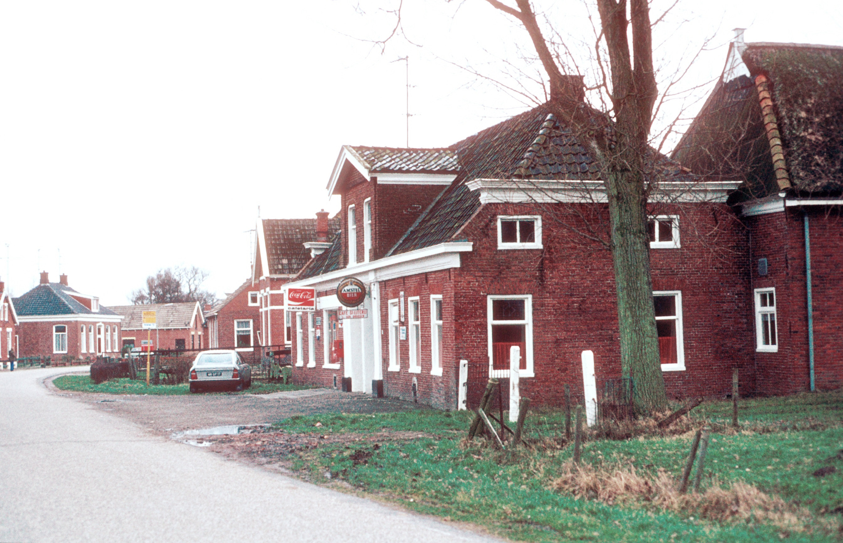 Cafe Slijterij in Westernieland.